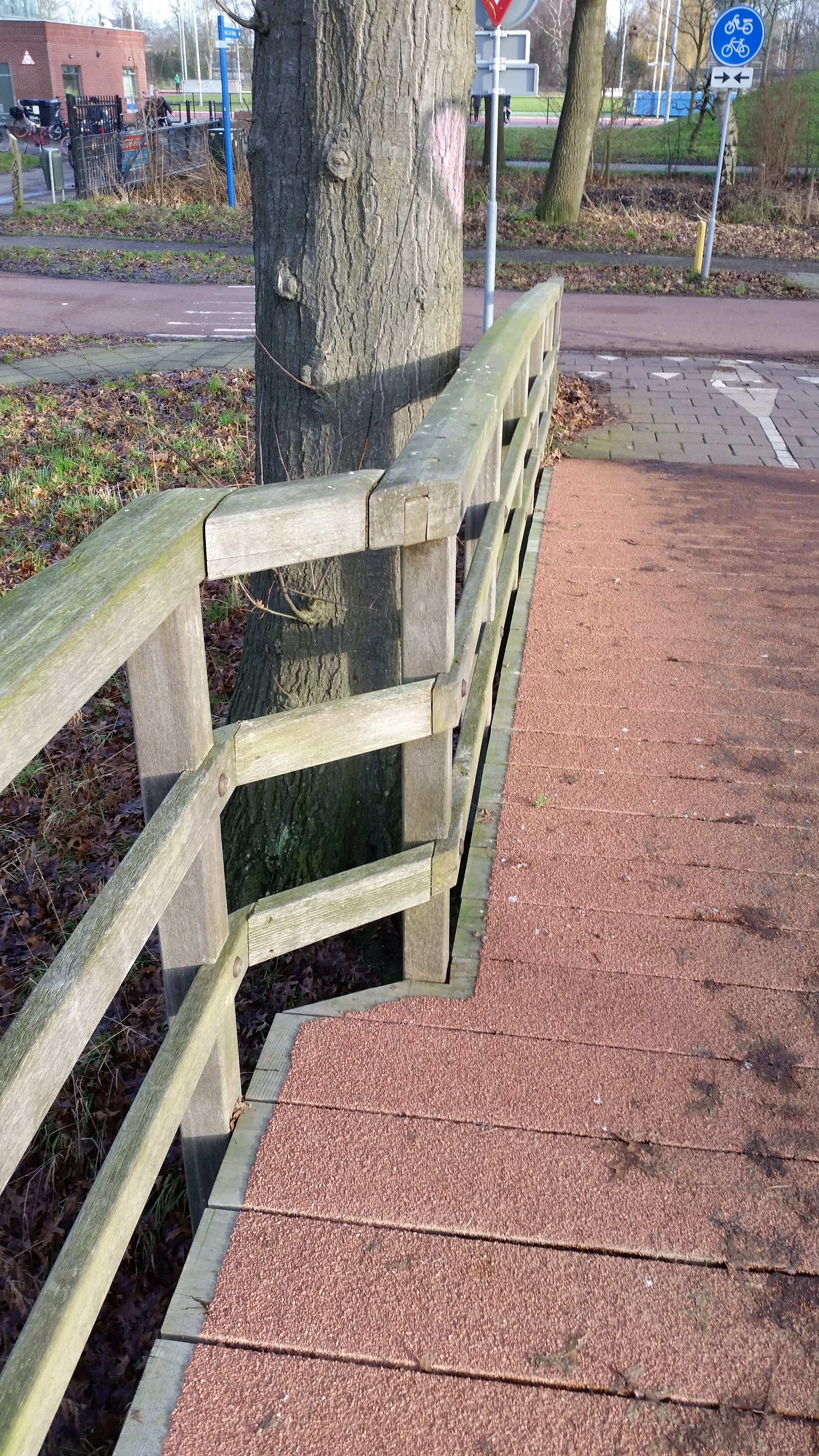 impressie van de Ruud Krolbrug in Watergraafsmeer (januari 2020)